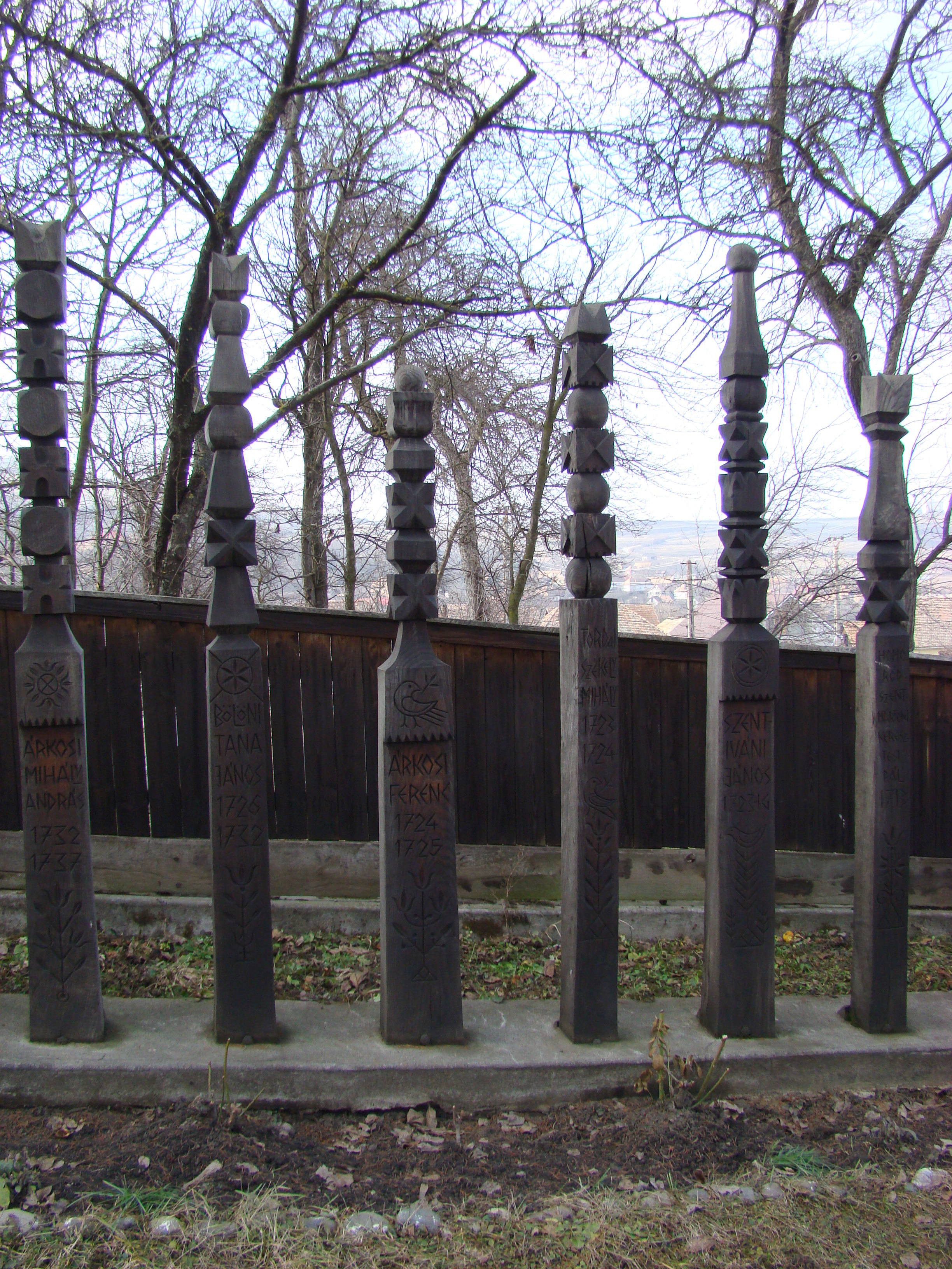 Biserica unitariană, sat DELENII; comuna BĂGACIU